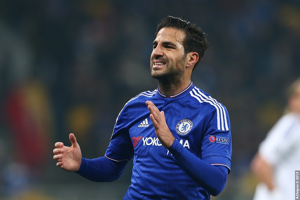 20.10.2015 Kyiv, Olimpiyskiy National Sports Complex Champions League. Group stage. FC Dynamo Kyiv - Chelsea - 0:0 Chelsea (4-2-3-1): Begovic; Zouma, Cahill, JT (c), Azpilicueta; Ramires, Matic; Willian, Fabregas (Oscar 75), Hazard; Diego Costa. Unused subs Blackman, Baba, Mikel, Traore, Kenedy, Falcao. Booked Zouma 67 Dynamo Kiev (4-1-4-1): Shovkovskiy; Danilo Silva, Khacheridi, Dragovic, Vida; Rybalka; Yarmolenko, Sydorchuk, Buyalskiy (Garmesh 83), Gonzalez; Kravets (Junior Moraes 78). Unused subs Rybka, Antunes, Petrovic, Gusev, Miguel Veloso. Booked Buyalskiy 65 20.10.2015 г.Киев. НСК "Олимпийский". Лига Чемпионов. Групповой этап Динамо — Челси 0:0 Динамо: Шовковский — Данило Силва, Драгович, Хачериди, Вида — Рыбалка, Буяльский (Гармаш, 83) — Ярмоленко, Сидорчук, Гонсалес — Кравец (Мораес, 78) Челси: Бегович — Аспиликуэта, Терри, Кэхилл, Зума — Матич, Рамирес — Виллиан, Фабрегас (Оскар, 75), Азар — Д. Коста Предупреждения: Буяльский — Зума